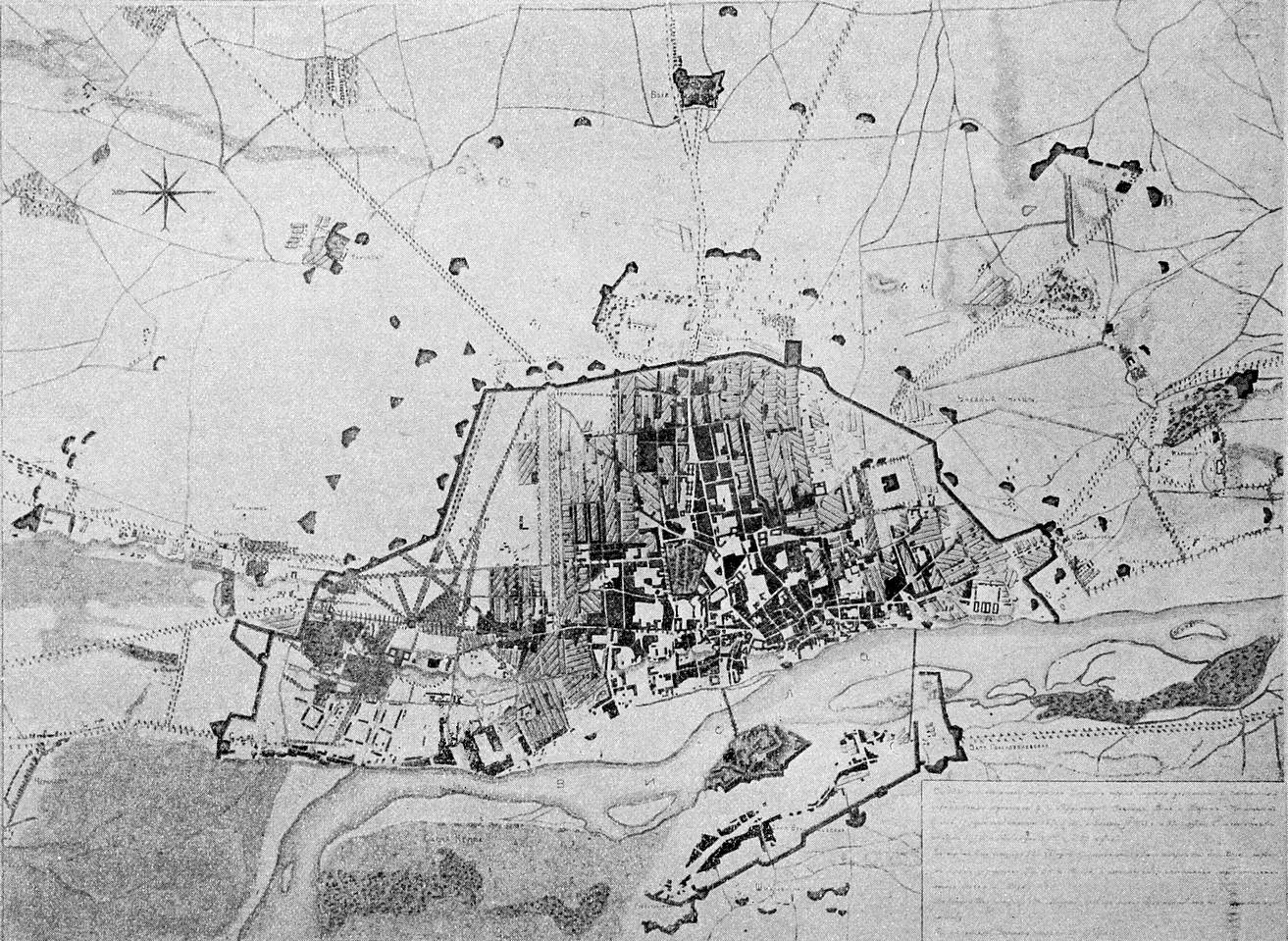 Данное изображение было использовано в статье «Варшава» опубликованной в пятом томе «Военной энциклопедии», который был издан книгоиздательским товариществом Ивана Дмитриевича Сытина в 1911 году в столице Российской империи городе Санкт-Петербурге.